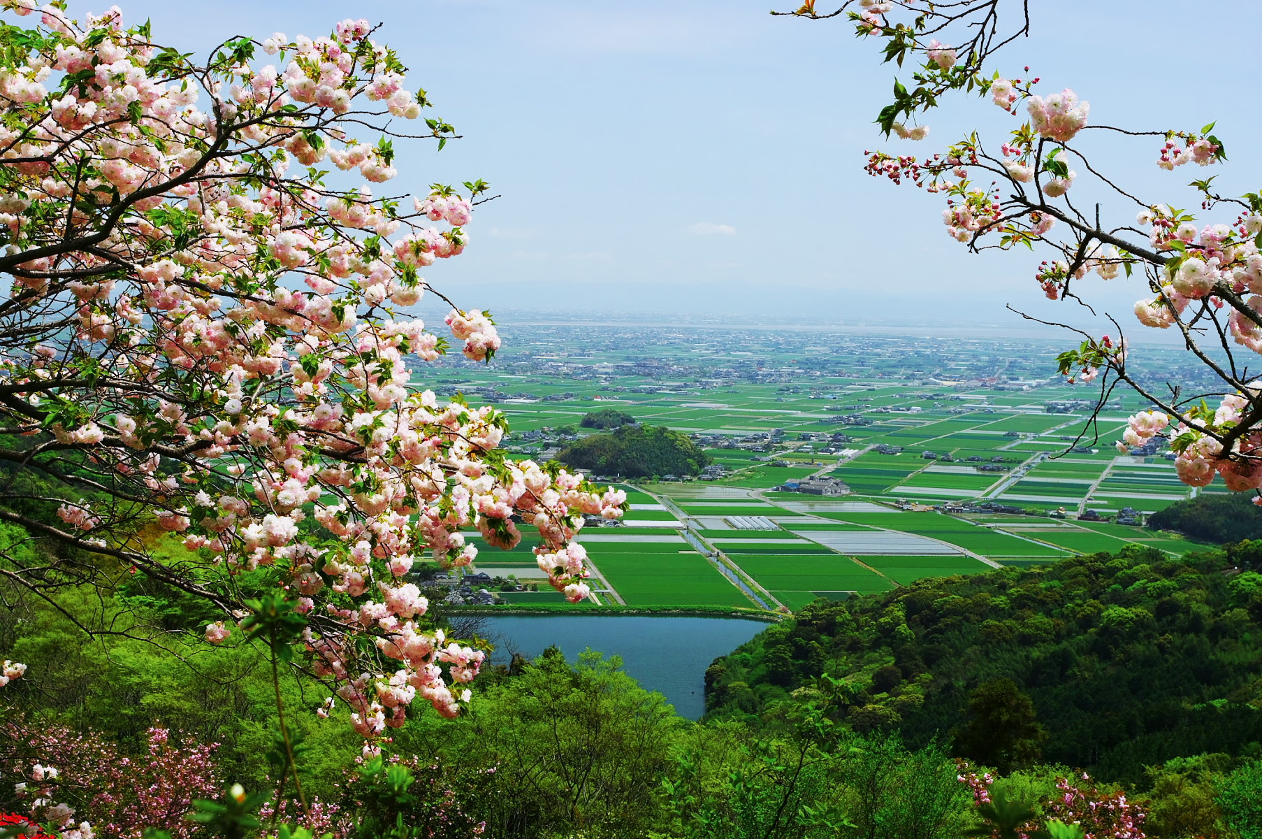 歌垣公園より白石平野